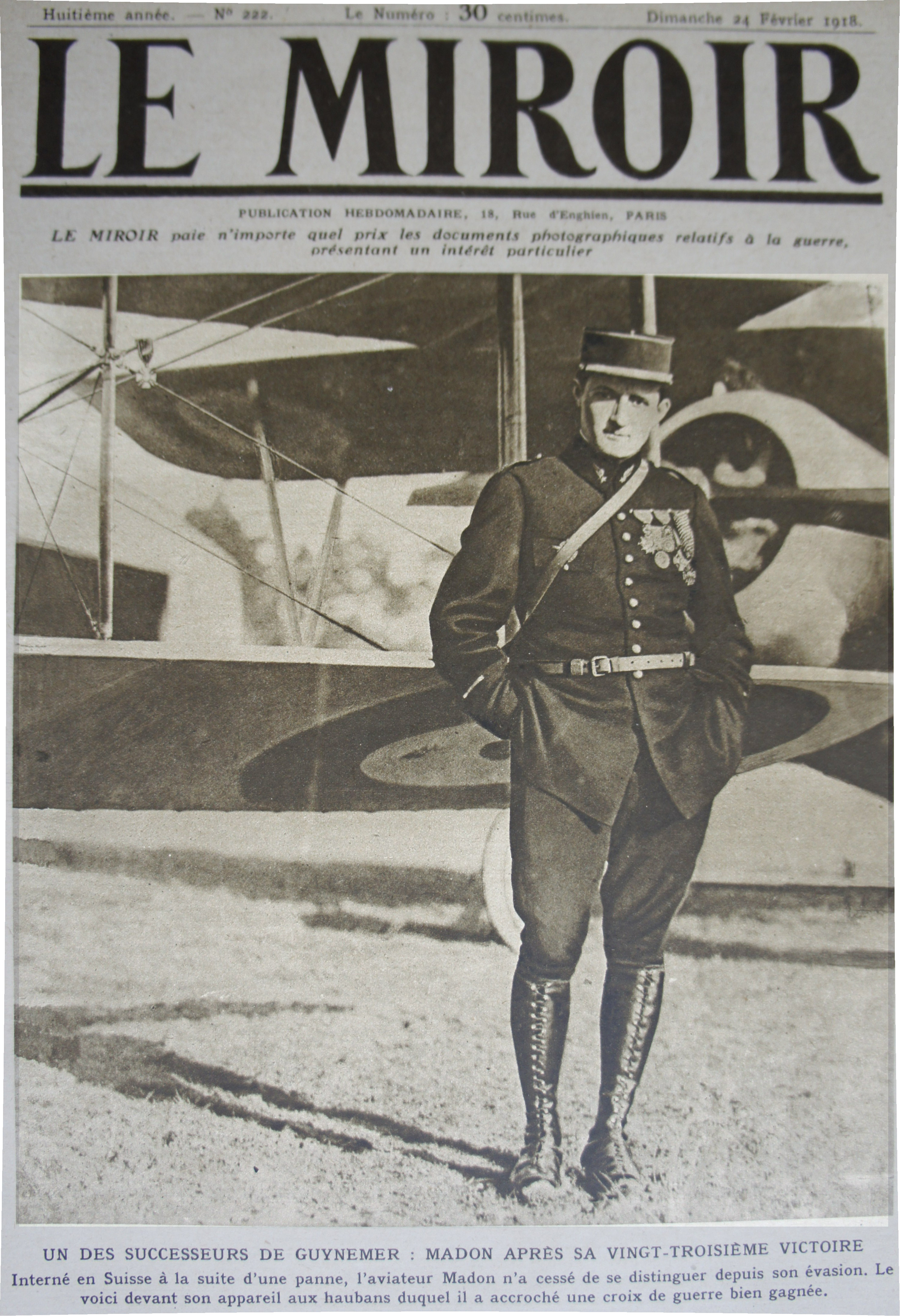 Madon dans le Mirori.N°222 le couverture.